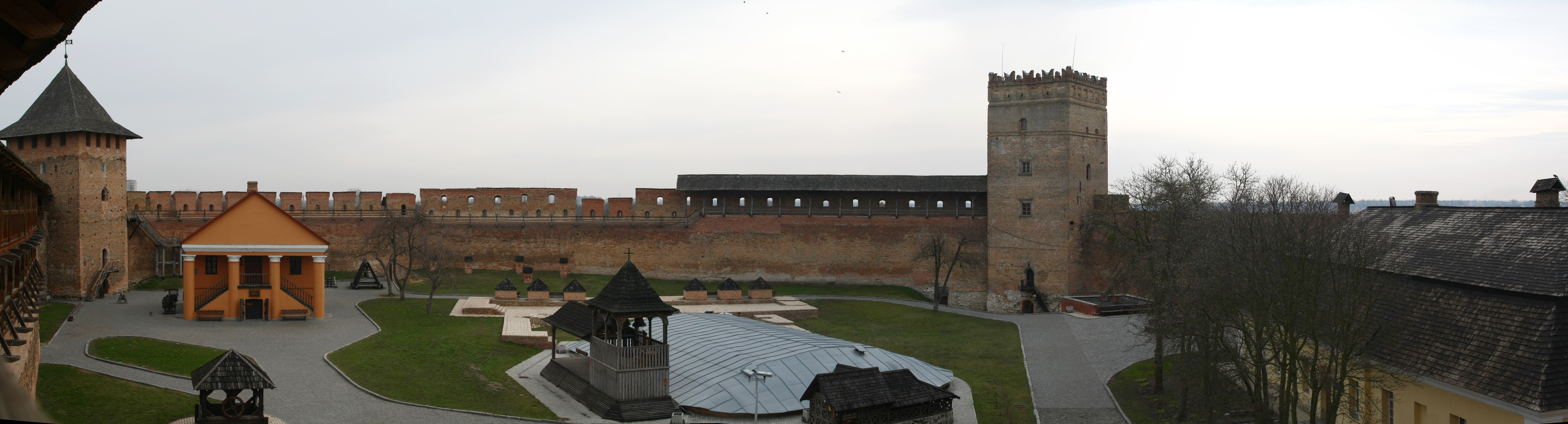 Луцьк